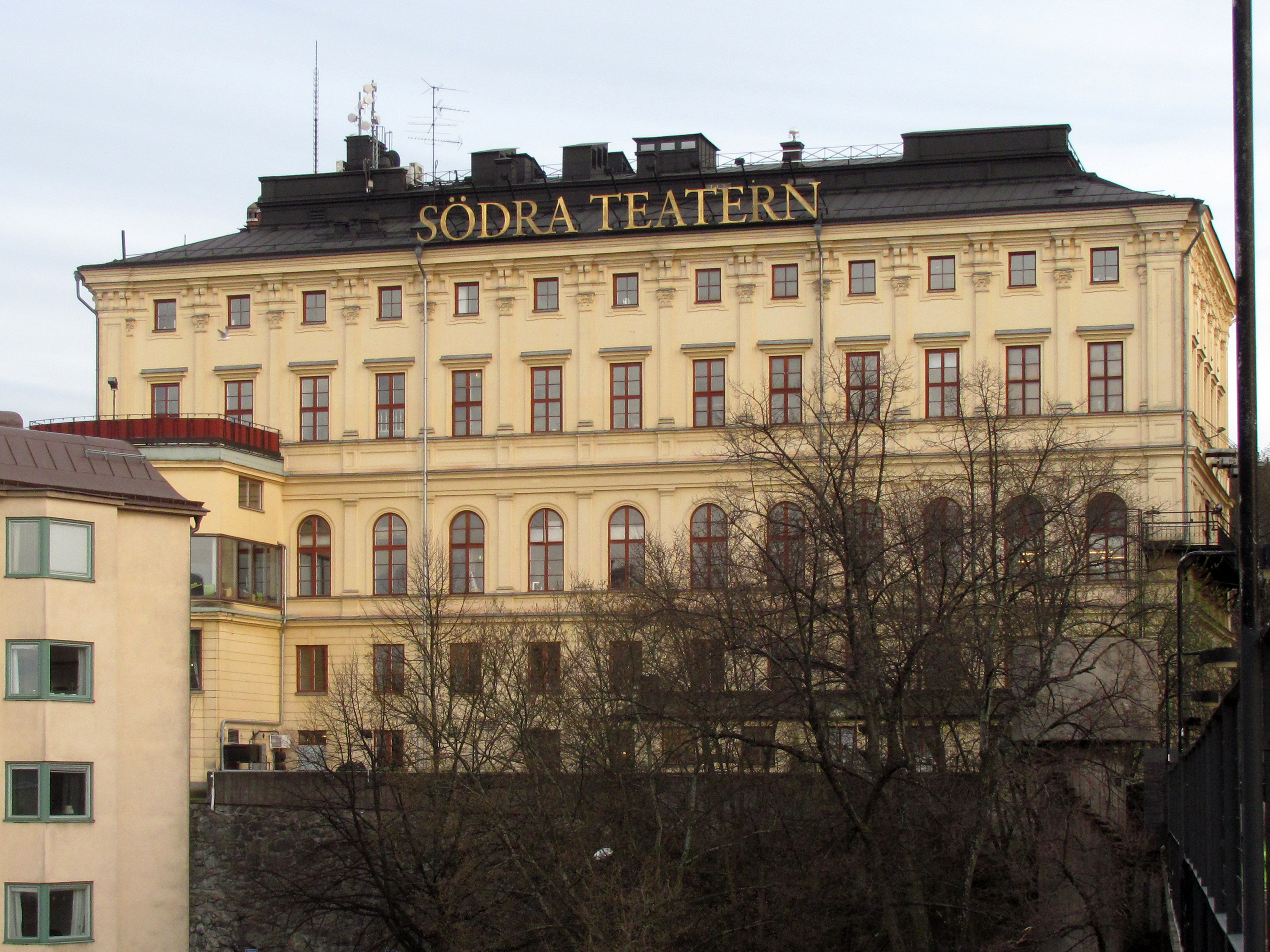 Södra teatern, norra fasaden